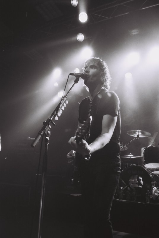 New Model Army en concert au Big Band Café, Caen/Hérouville Saint-Clair